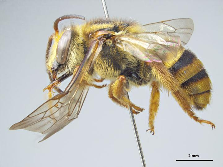 Mellitidia tomentifera male